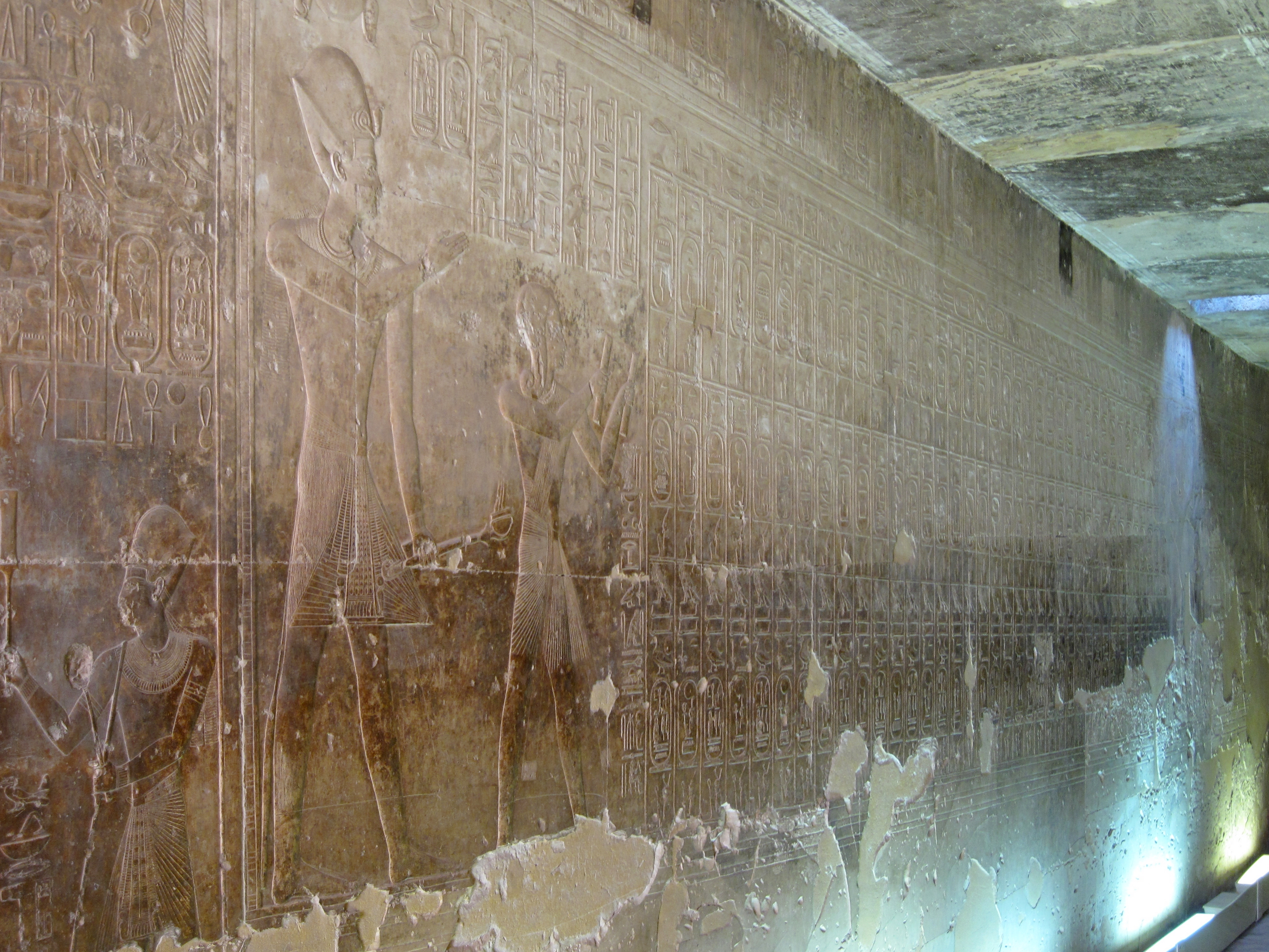 Königsliste im Totentempel Sethos I. in Abydos, Ägypten